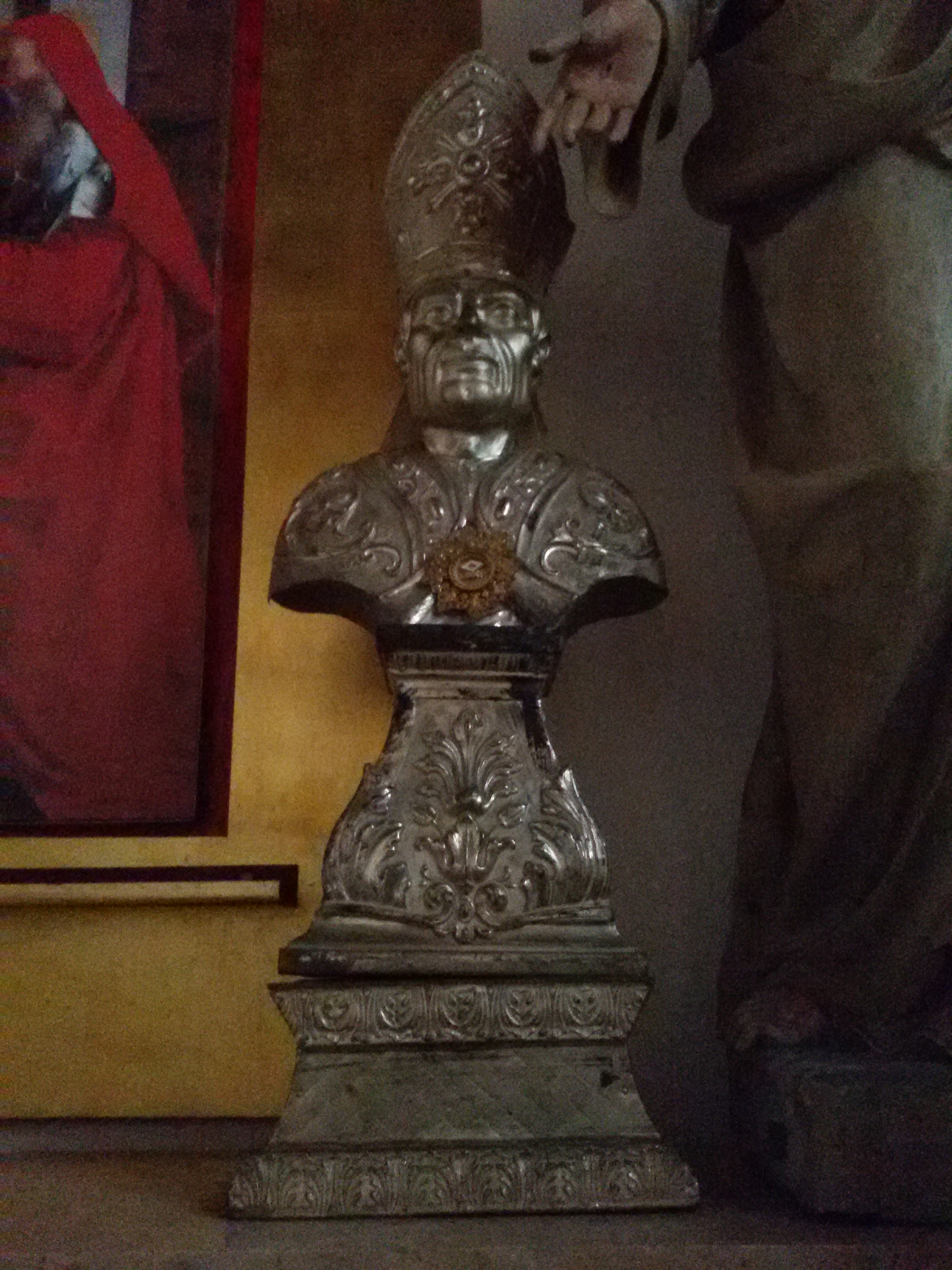 Chiesa di Santa Cristina Quinto di Treviso